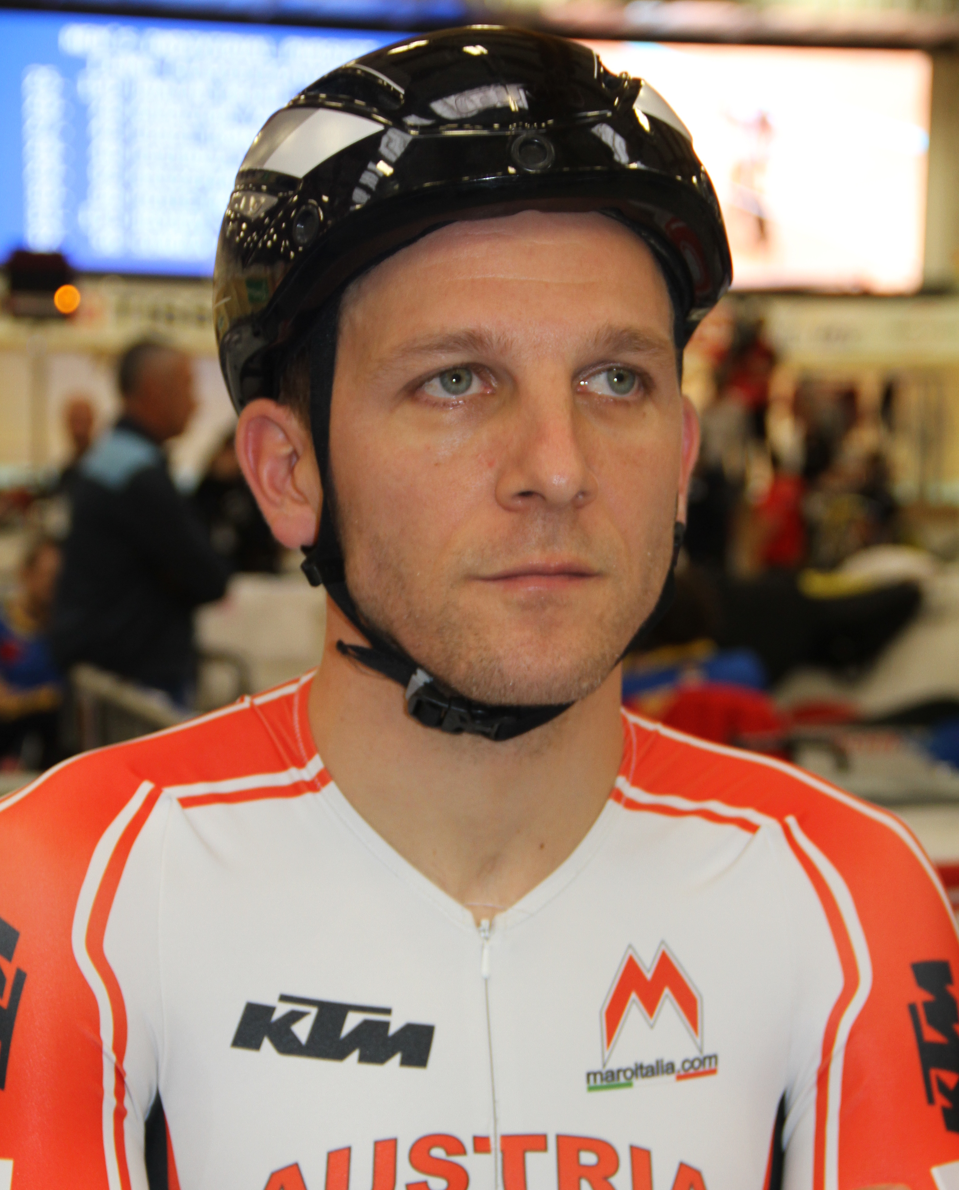 Andreas Müller, österreichischer Radsportler The making of this document was supported by the Community-Budget of Wikimedia Germany.